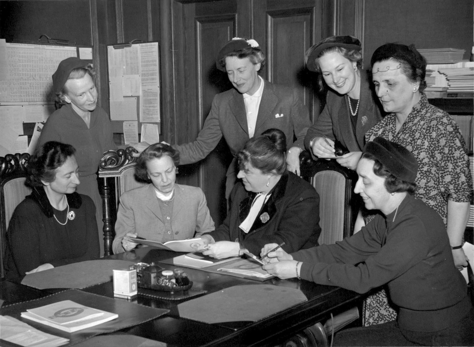 Jubileumsfirandet diskuteras av fruarna Kitty Zetterberg, Märtha Stenbeck, fröken Margareta Sjöqvist, fru Märta Upmark, rektor Ingegerd Granlund och fruarna Birgit Littorin, Eva Norlin och Clara Westman-Ostrogorsky.Med en stor minnesfest i Stadshuset den 17 oktober kommer en känd stockholmsskola, Nya elementar för flickor, att fira sitt 50-årsjubileum. De närmare planerna diskuterades på fredagskvällen vid ett första sammanträde i den kommitté som bildats inför jubiléet.